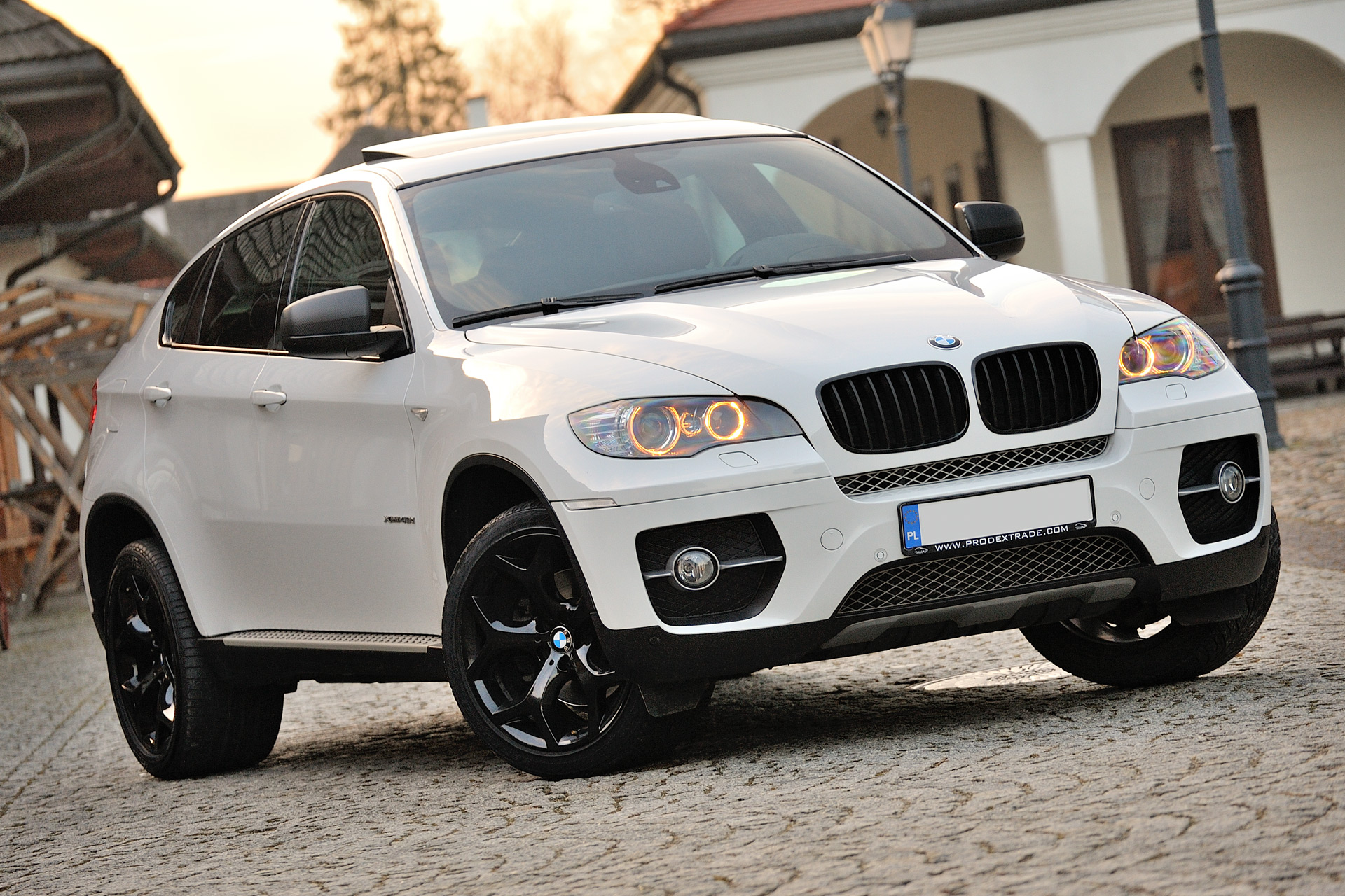 BMW X6